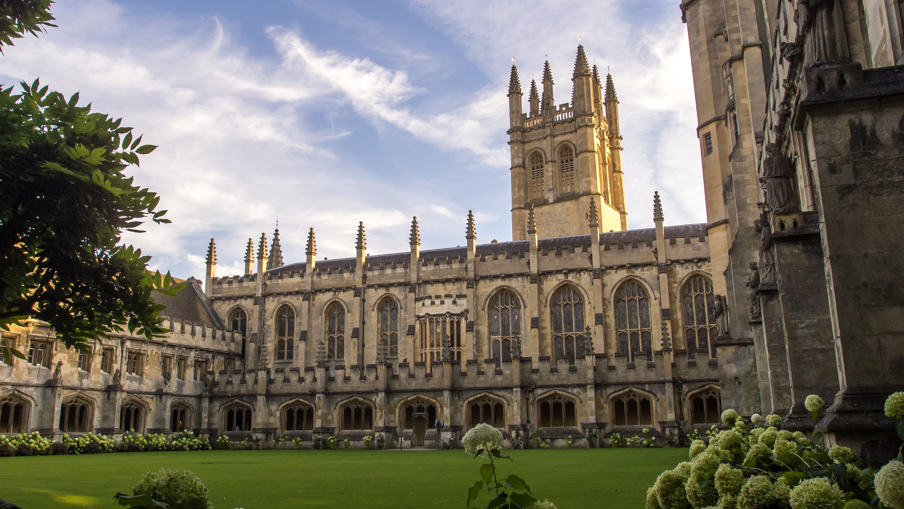 Magdalen College, Oxford